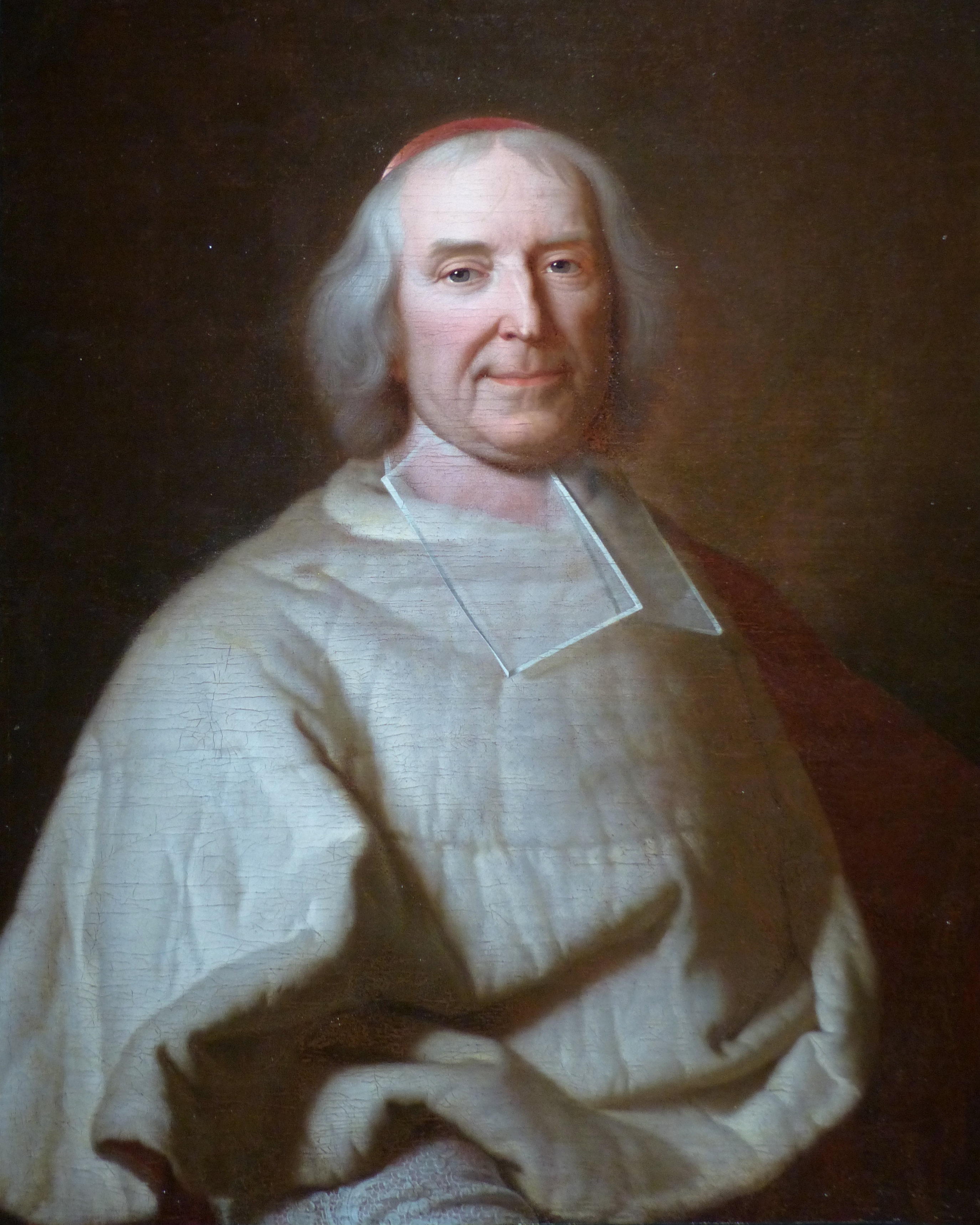 Perpignan (Pyrénées-Orientales, France), musée Hyacinthe Rigaud, collection peinture civile. Portrait du cardinal de Fleury en 1729, principal ministre de Louis XV.